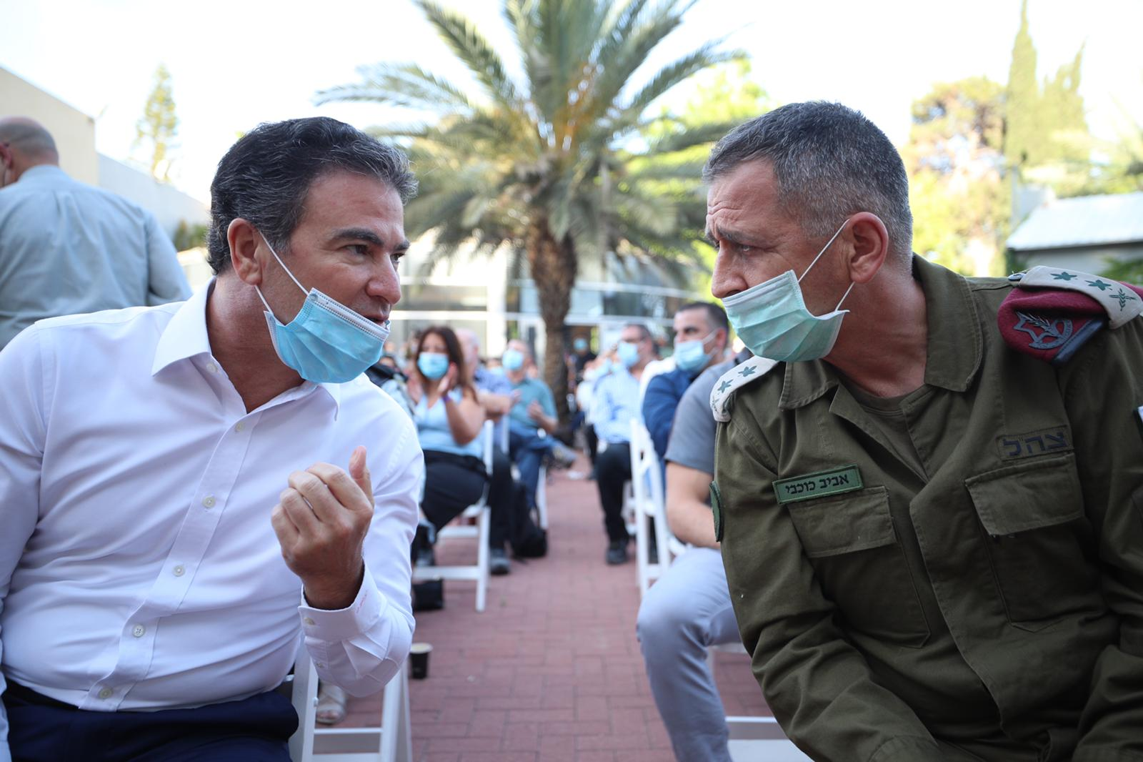 טקס סיום הפעילות במרכז השליטה הלאומי למאבק בקורונה , משוחחים מימין: הרמטכ"ל רא"ל אביב כוכבי וראש המוסד יוסי כהן